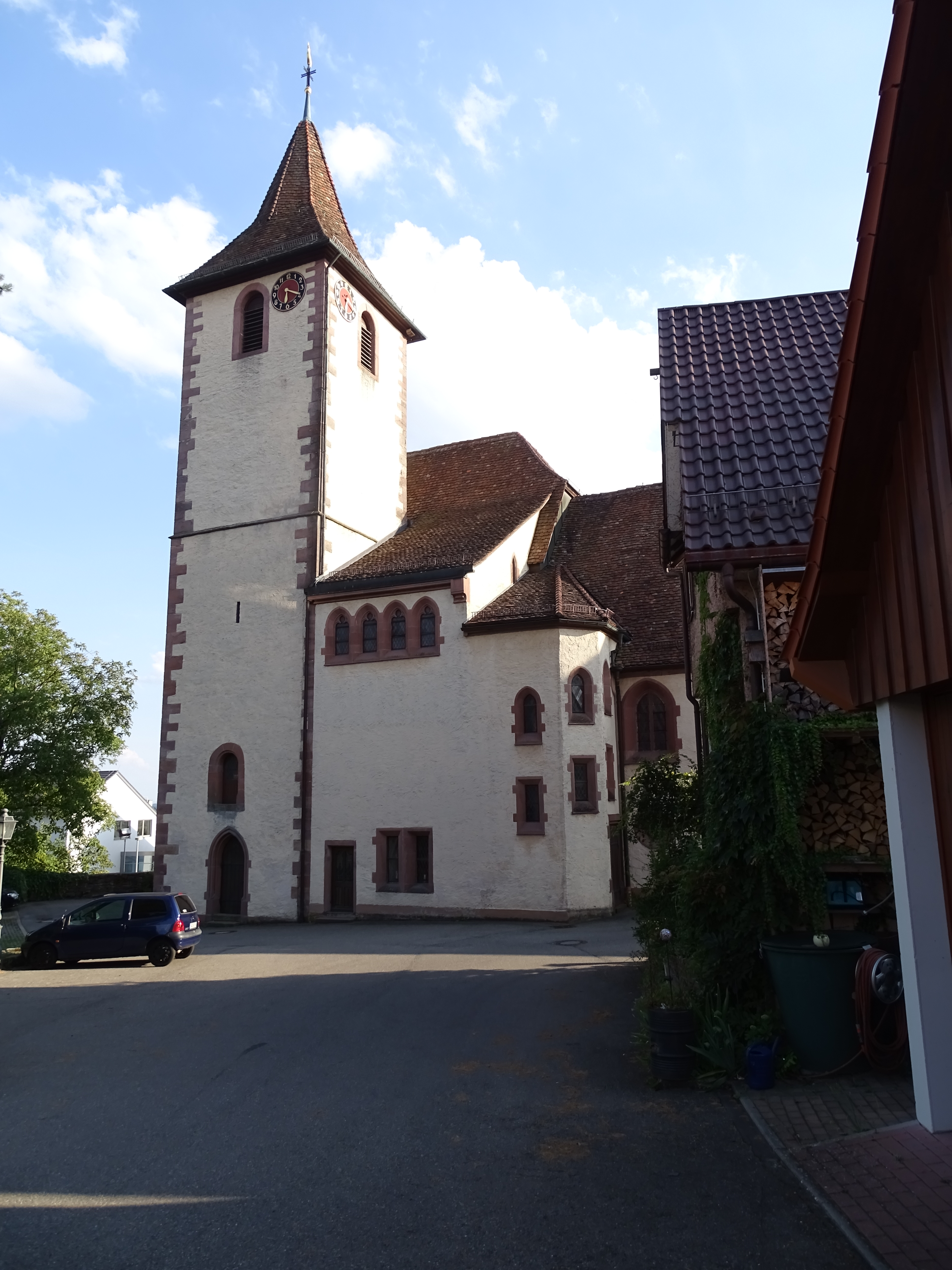 Häuser und Straßenansichten in Neubulach